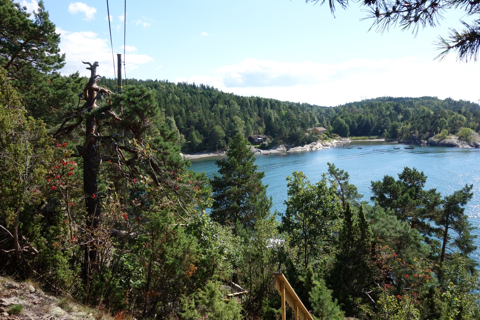 Utsikt ned til Emmerstadbukta